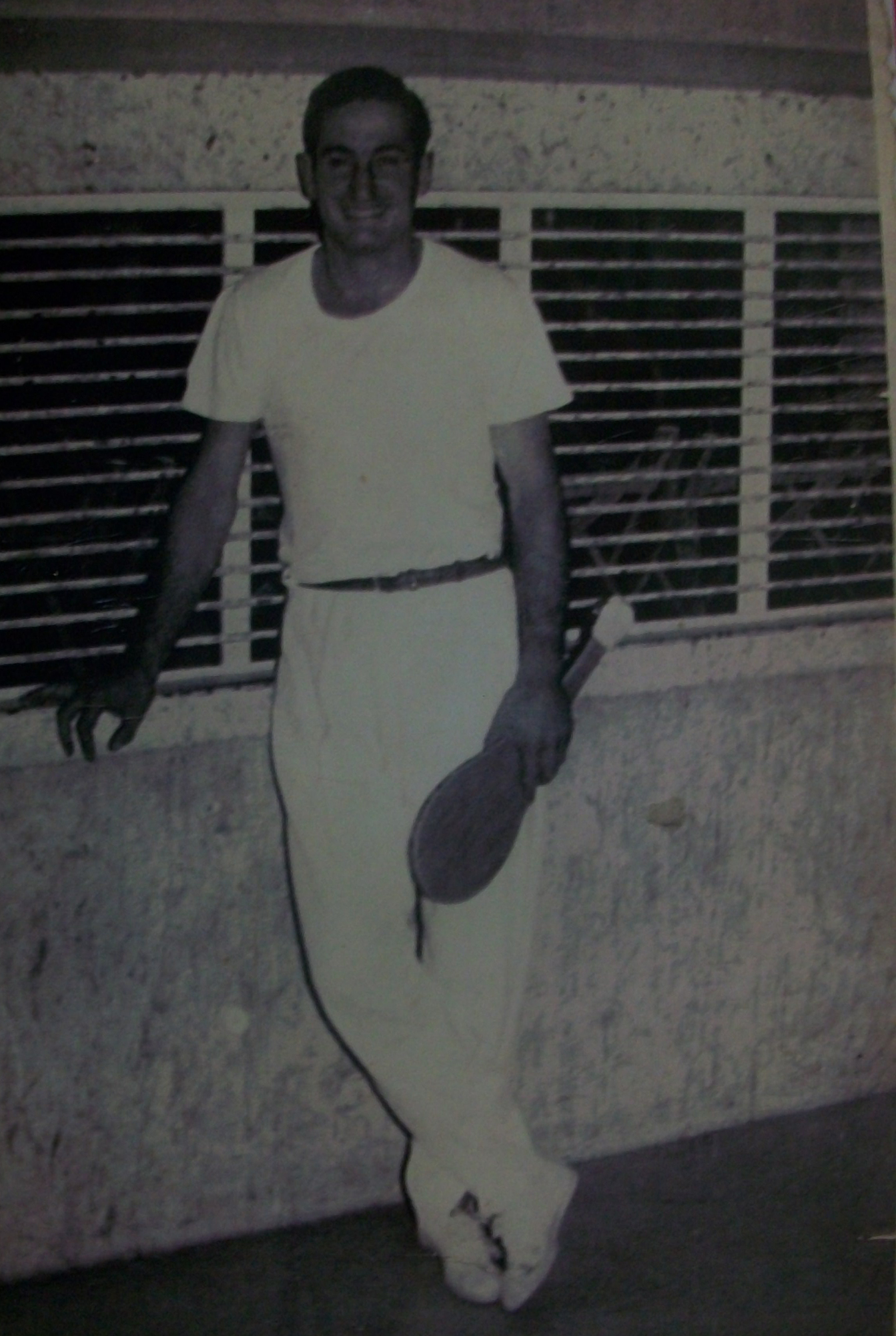 Domingo Olite: pelotari argentino. Ganador de medallas de oro en los Campeonatos Mundiales de Pelota vasca, Campeonatos Metropolitanos y Campeonatos Argentinos.